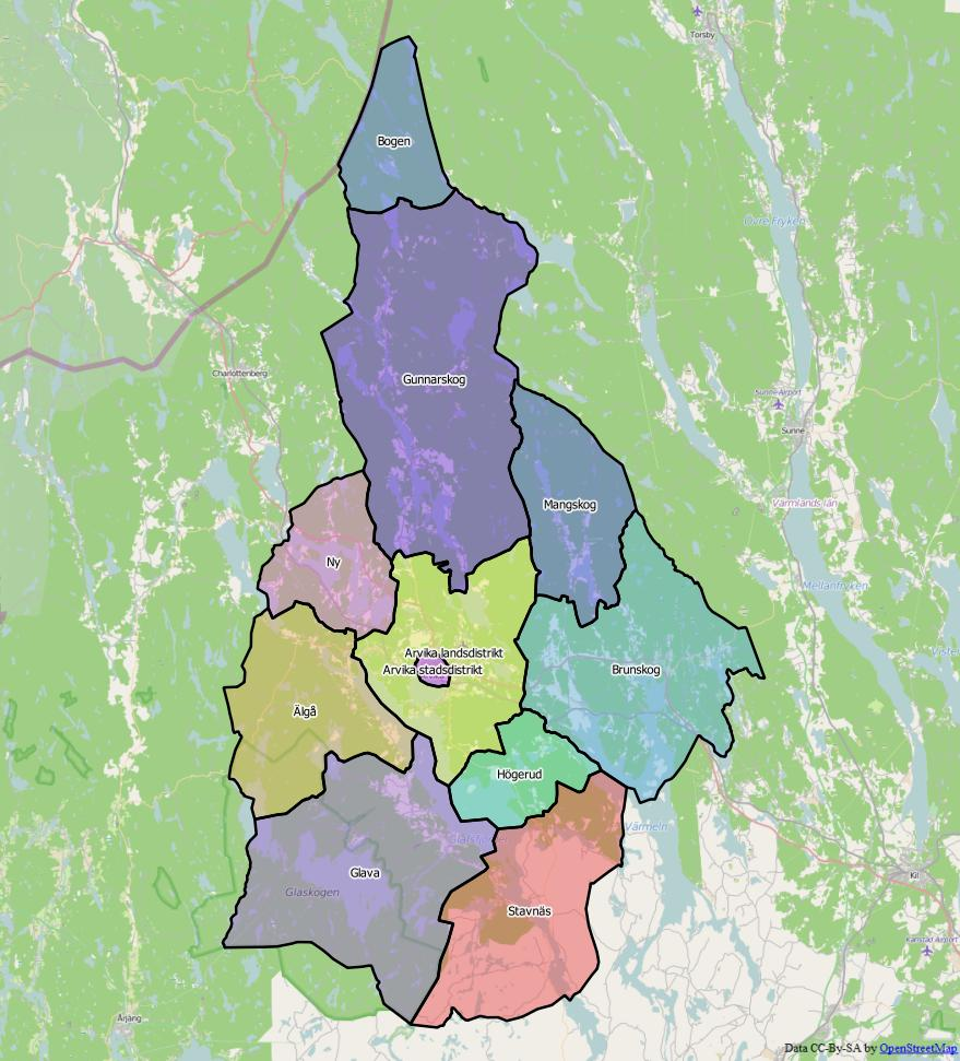 Distriktsindelningen i Arvika kommun